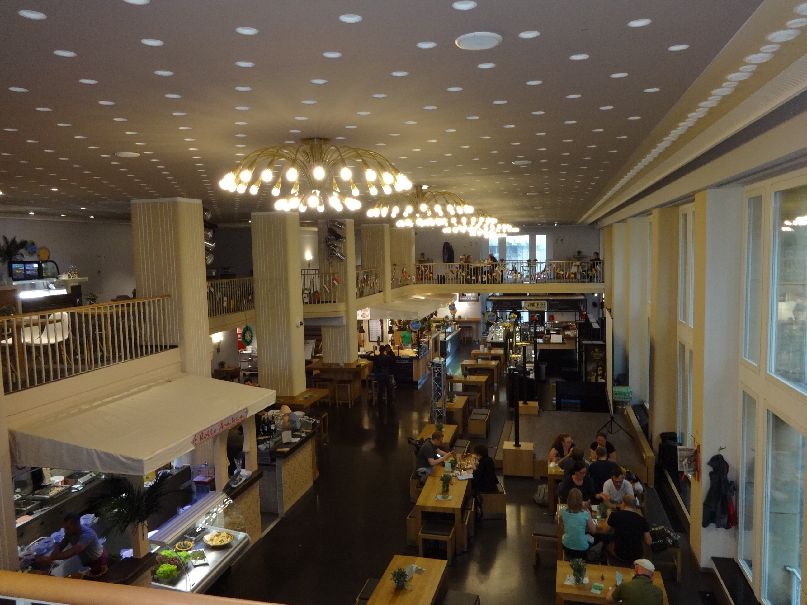 Saal an der Ostseite des Café Prag